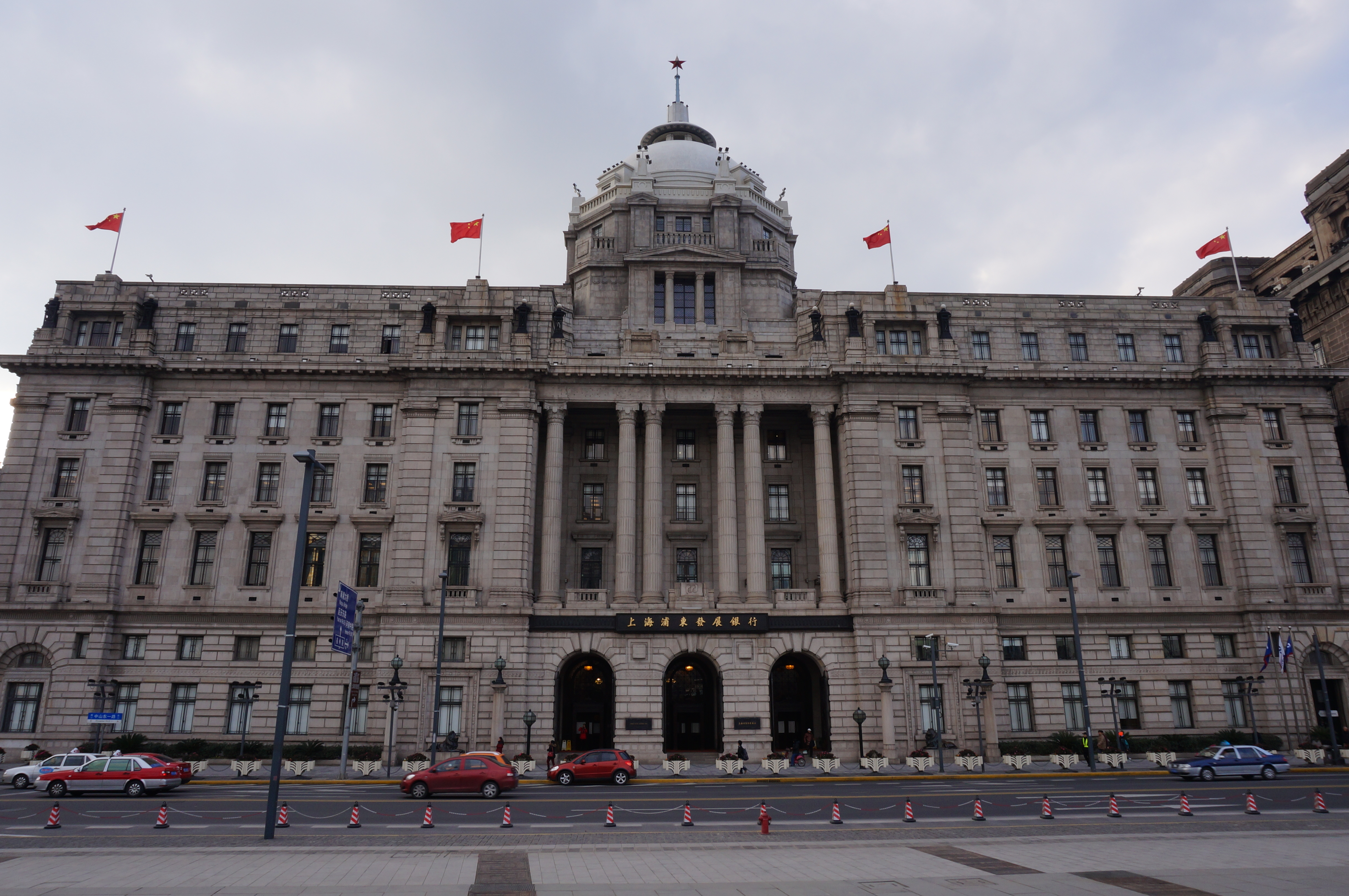 外滩汇丰银行大楼